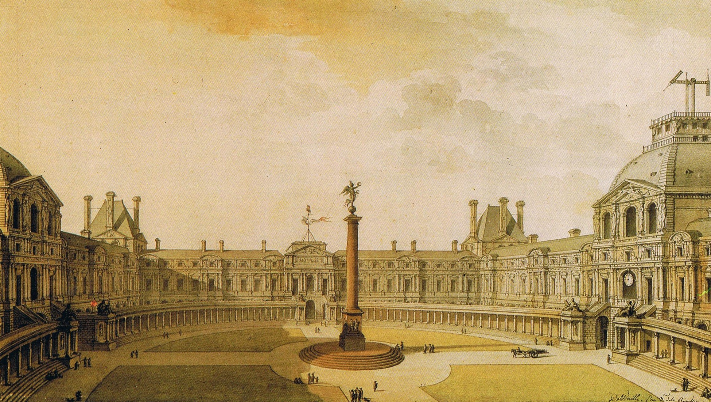 Aquarelle présentant l'aménagement de la Cour Carrée du Louvre